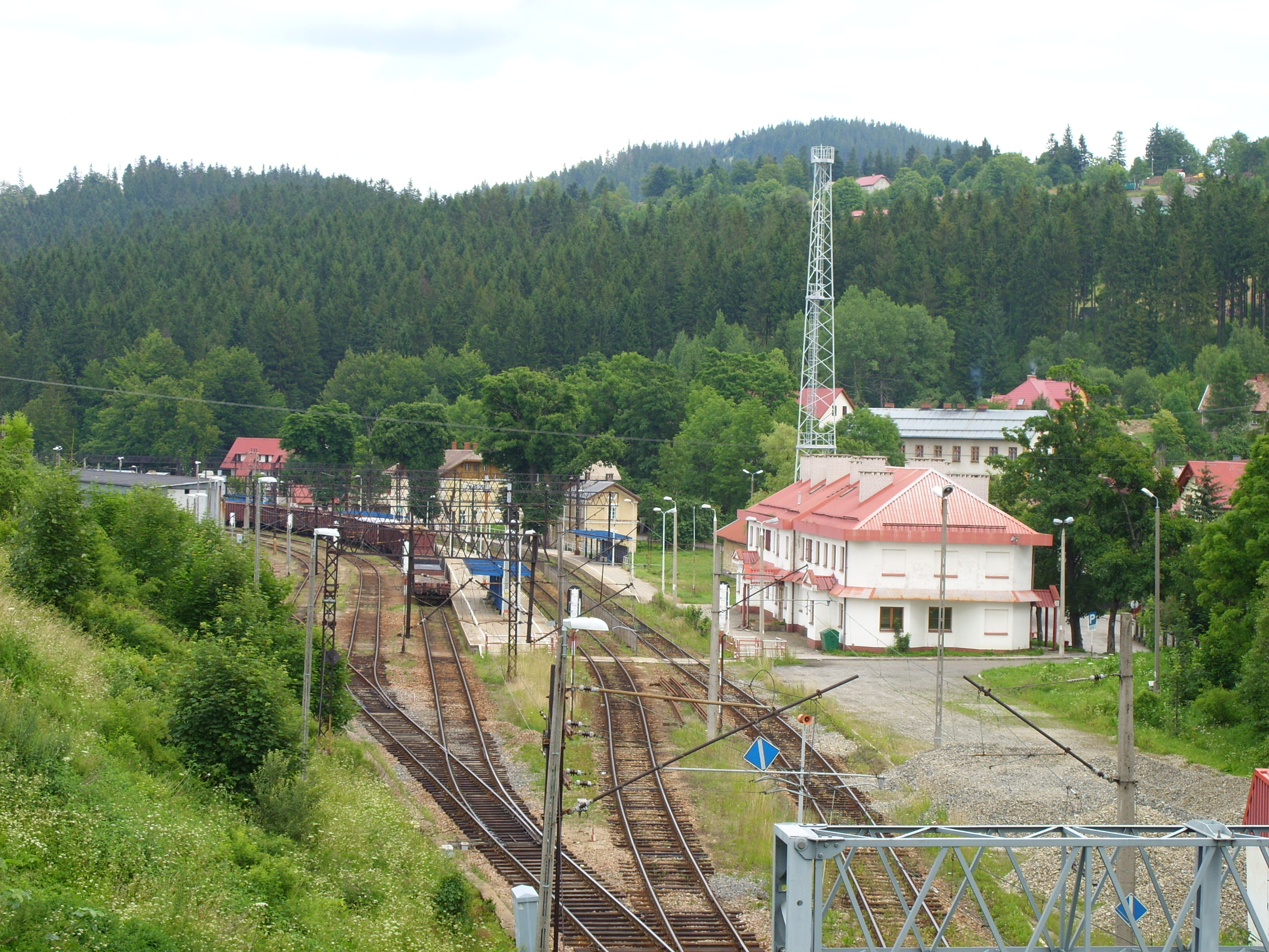 Zwardoń, budynek po byłej siedzibie granicznej placówki kontrolnej Straży Granicznej (SG), od listopada 1995 roku do 24 sierpnia 2005 roku, na stacji kolejowej w Zwardoniu.